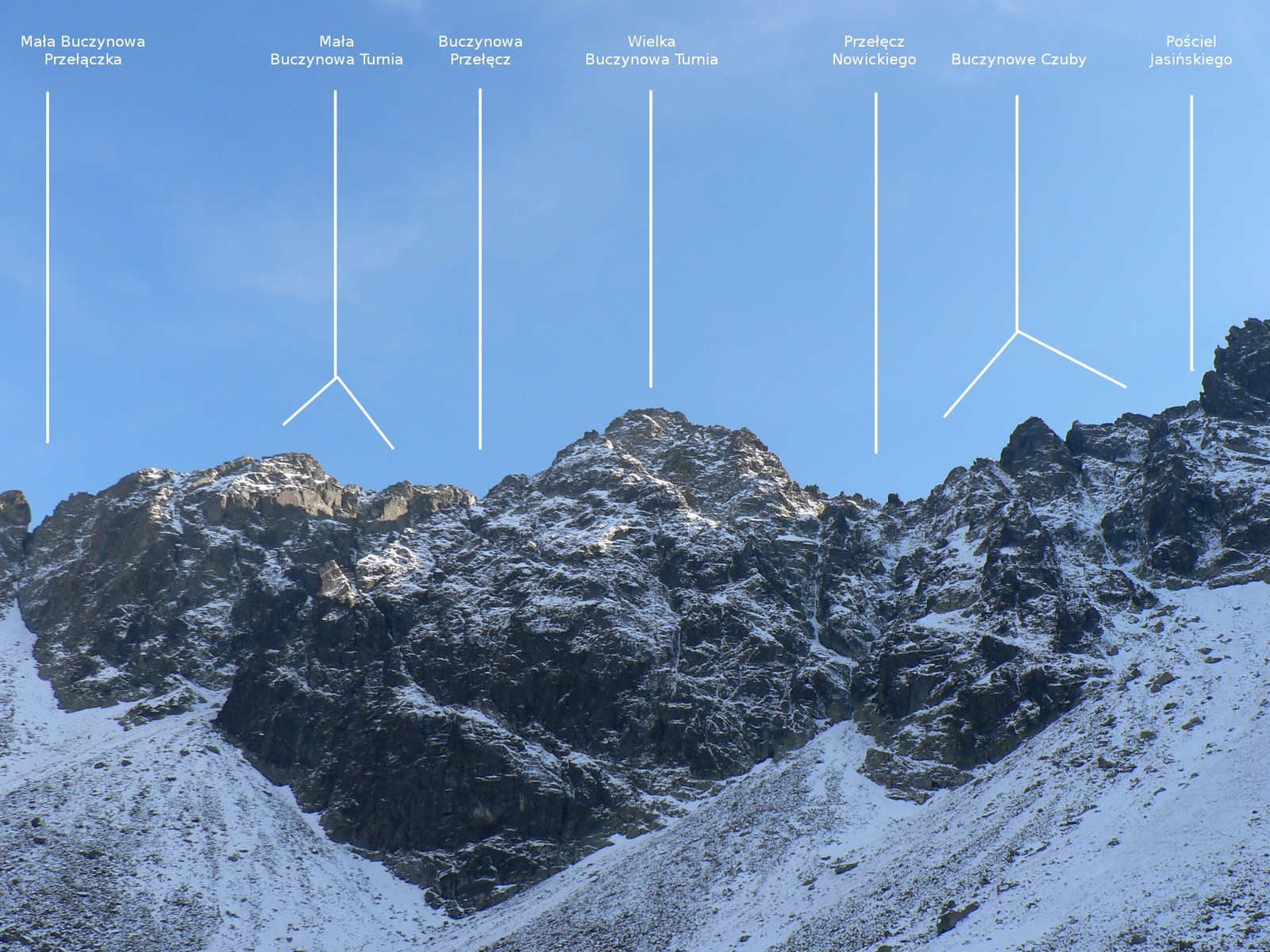 Buczynowe Turnie od północy z Doliny Pańszczycy, od lewej: Mała Buczynowa Przełączka, dwa wierzchołki Małej Buczynowej Turni, Buczynowa Przełęcz, Wielka Buczynowa Turnia, Przełęcz Nowickiego, Buczynowe Czuby, Pościel Jasińskiego